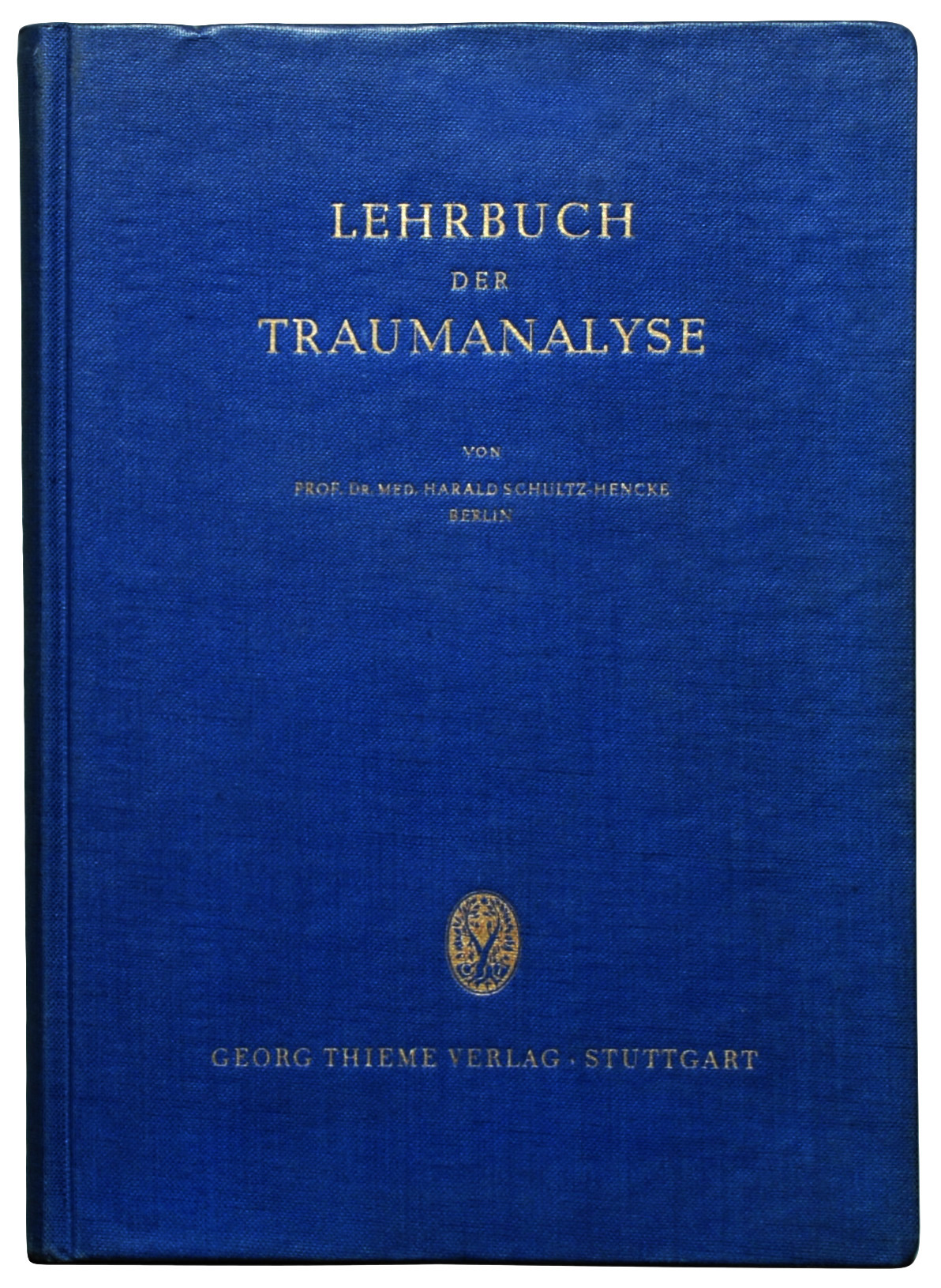 Schultz-Hencke, Harald: Lehrbuch der Traumanalyse. Stuttgart: G. Thieme 1949, XII Seiten + 283 Seiten + 1 leere Seite + 1 Blatt Verlagsanzeigen. 1.Auflage. Original-Leinen großes 8°.